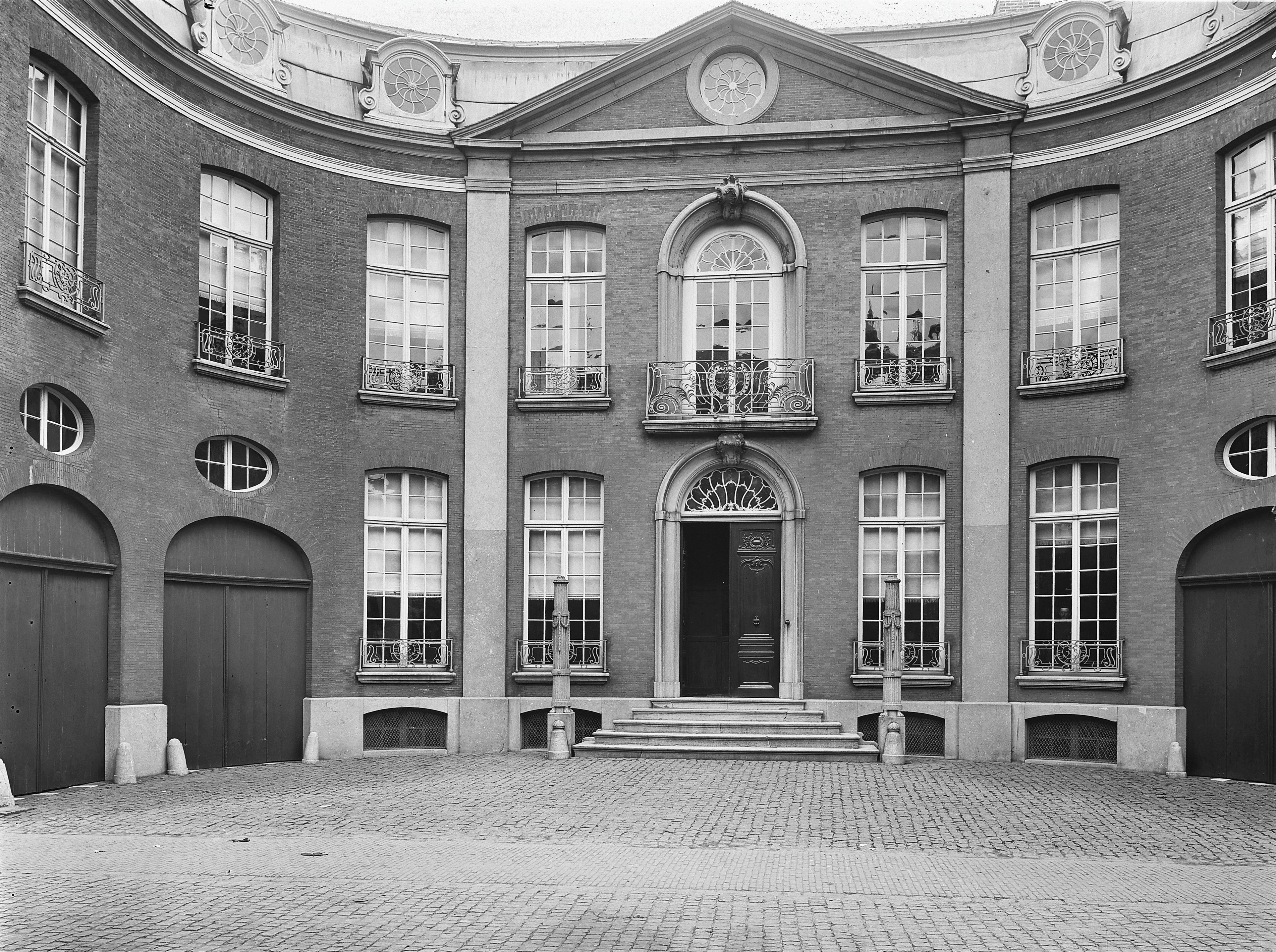 Van De Perrehuis: Zicht op het middendeel van de voorgevel, met ingang, fronton en een deel van de rondgebogen zijvleugels